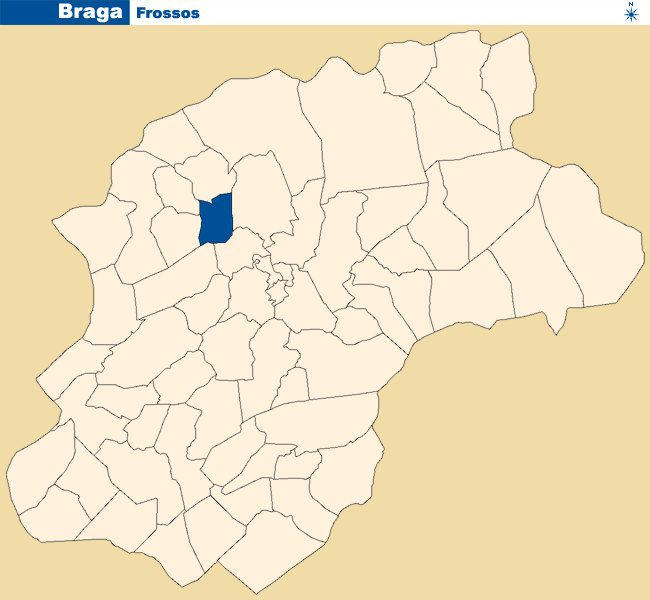 Localização de Frossos no concelho de Braga.